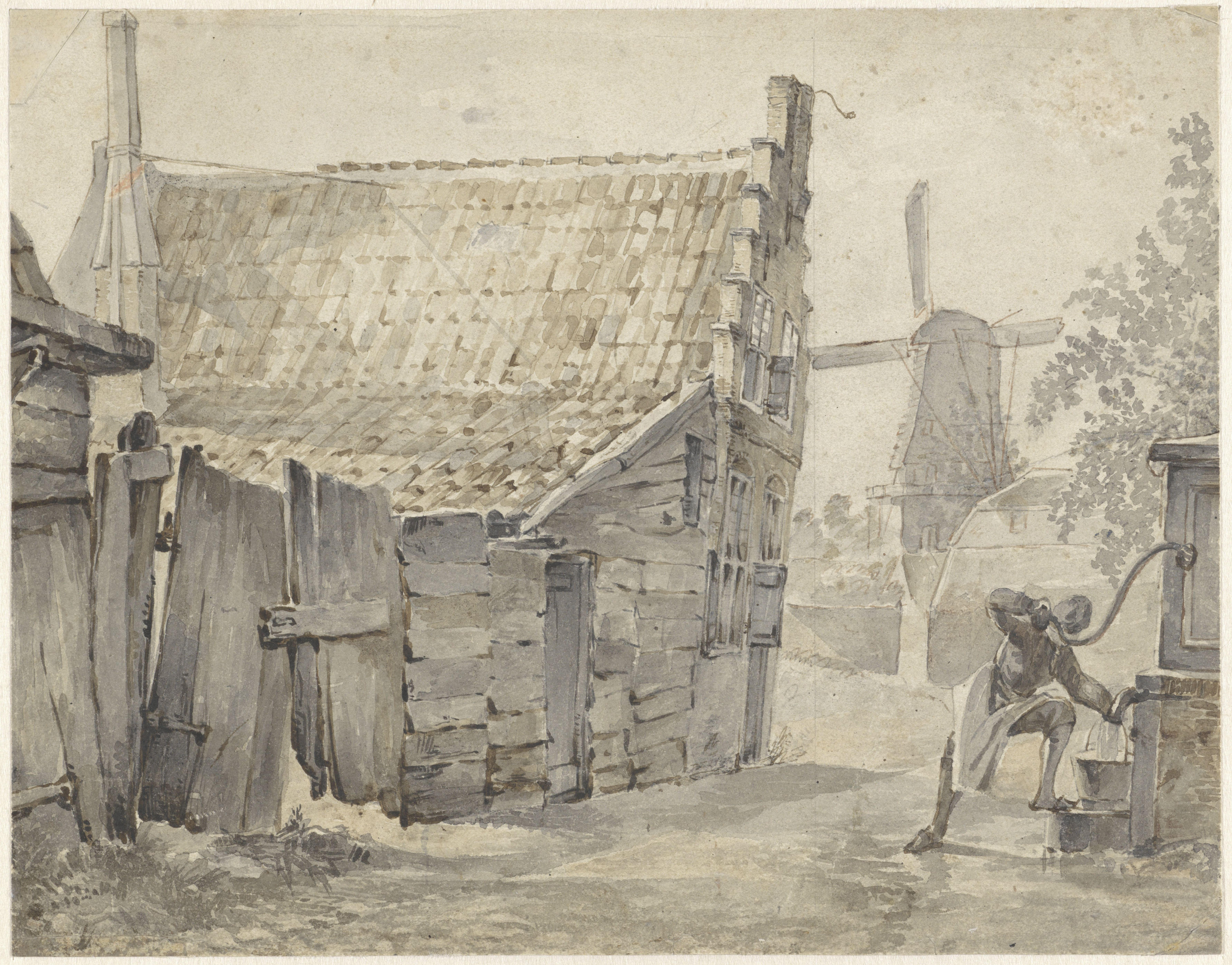 Aan de Papentorenvest te Haarlem door Hendrik Savrij (1822-1907)